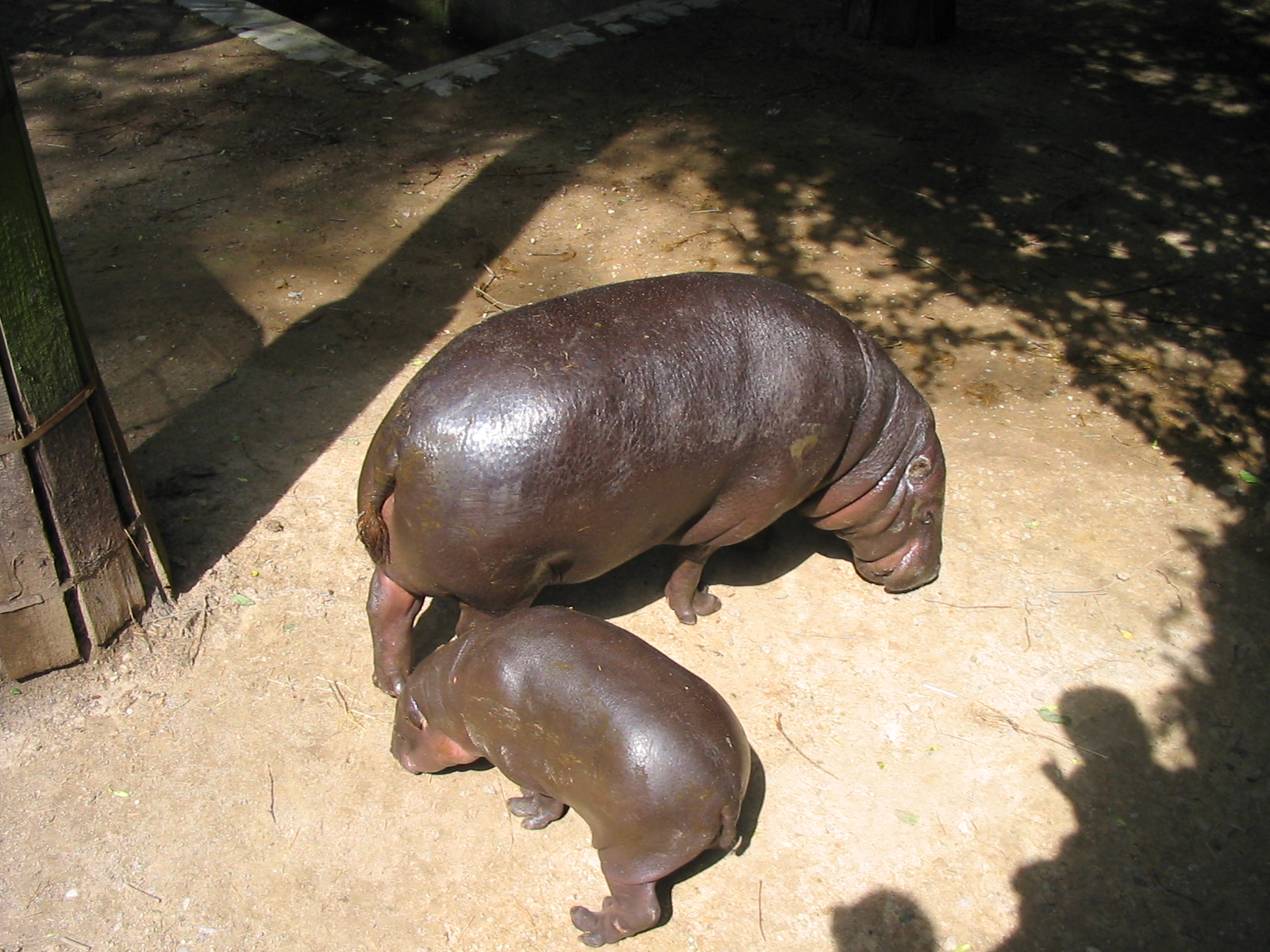 Matka s mládětem. Template: Hexaprotodon liberiensis , mother and baby